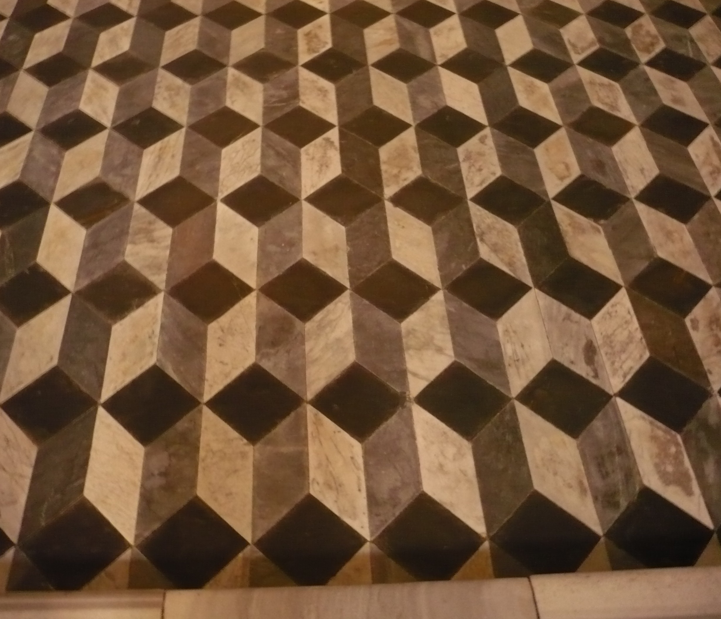 Von Francesco Borromini um 1646-1650 geschaffener Fußboden in der römischen Basilika San Giovanni in Laterano